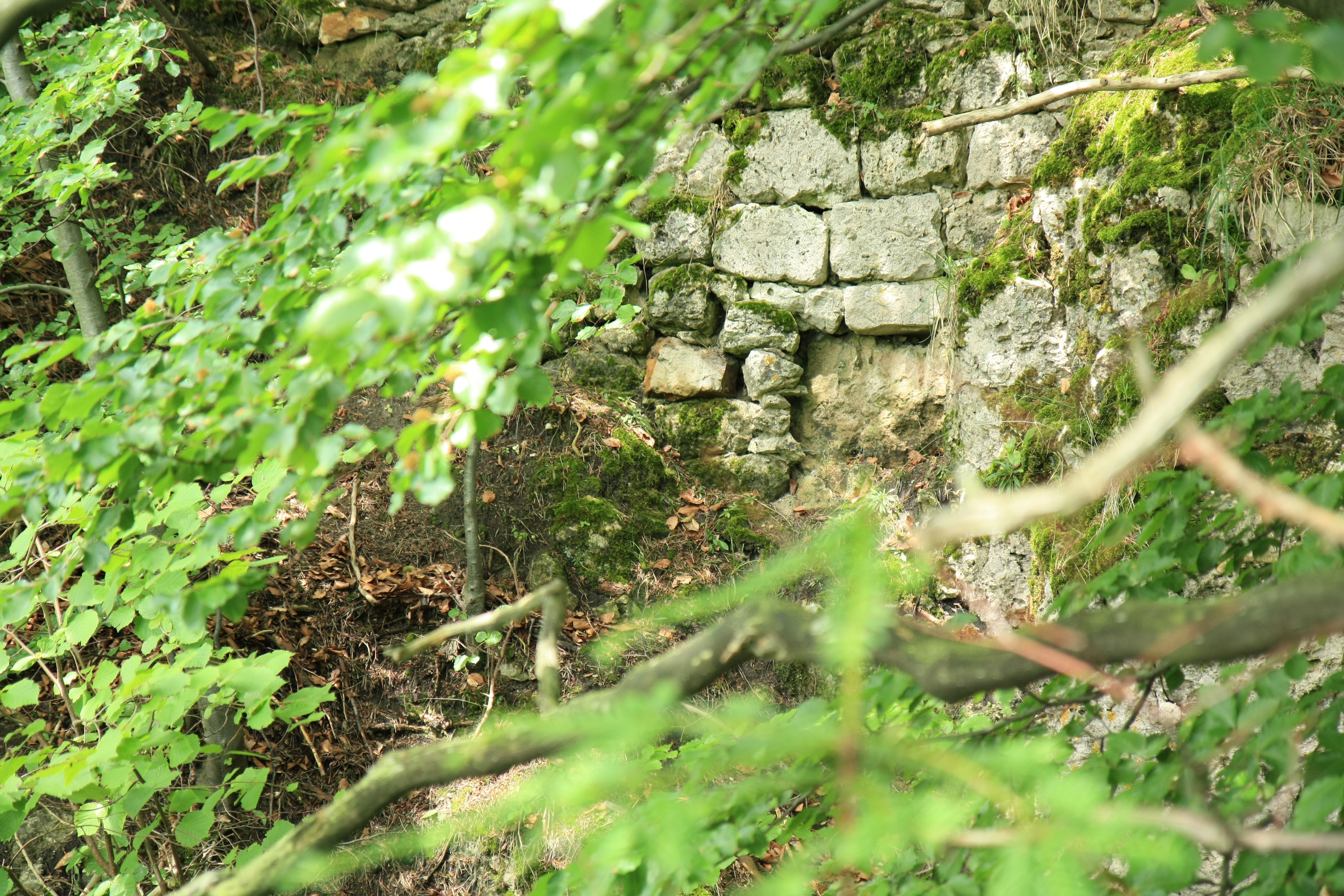 Mauerrest mit Quader der Ruine Stierberg